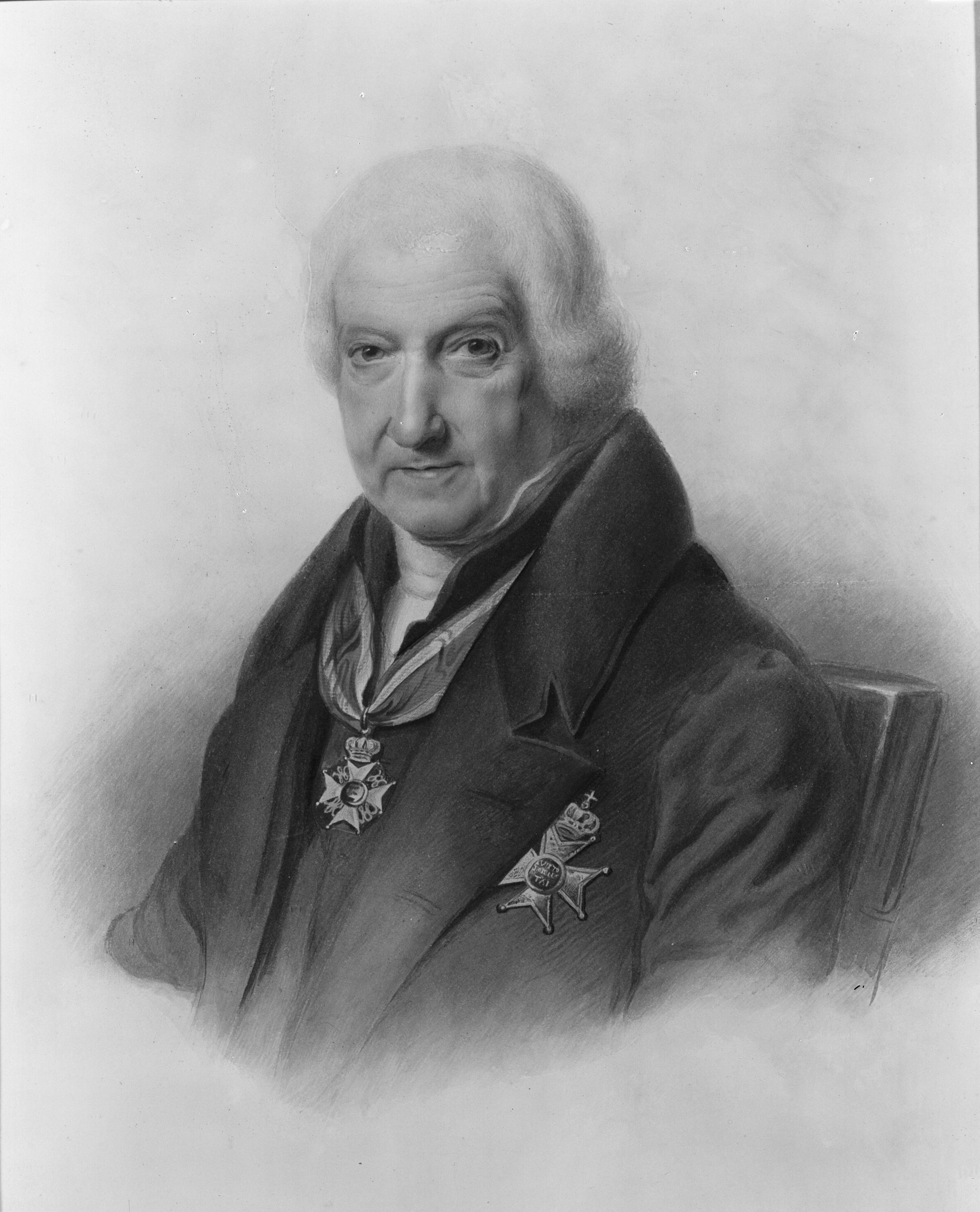 Portret van Anthoni Willem Philipse (1766-1845)